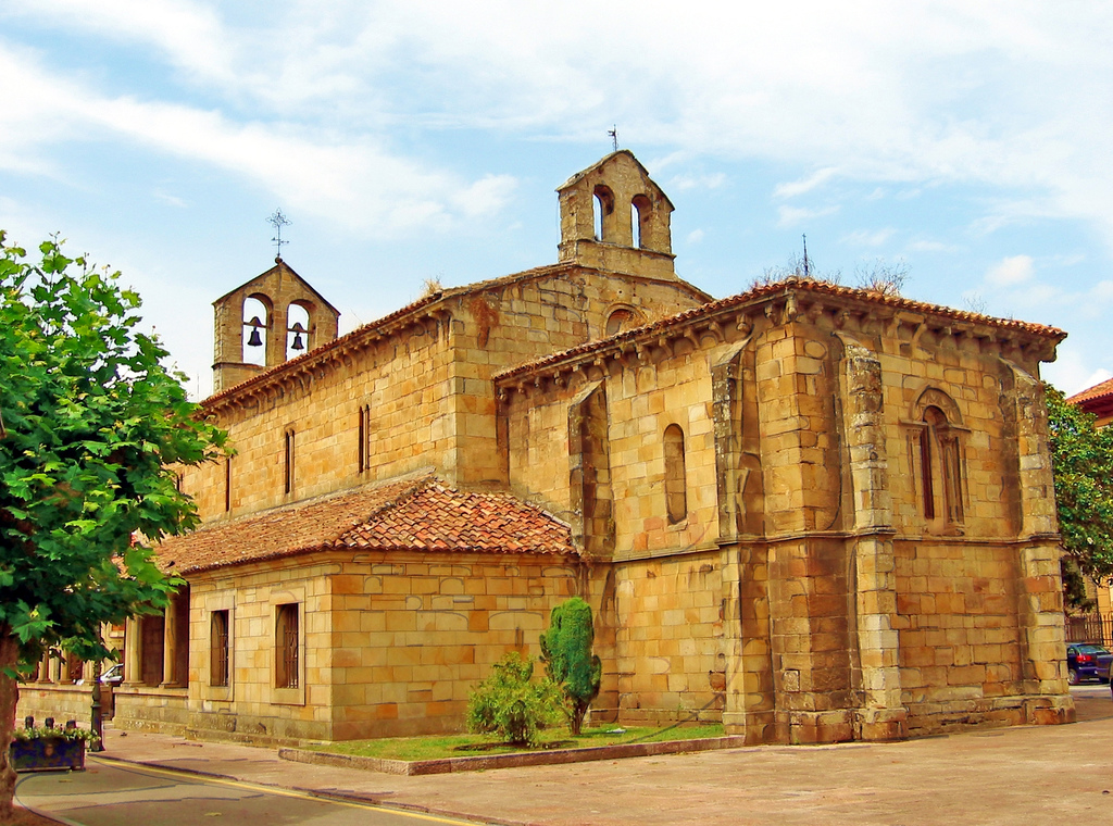 Igleisa de Santa María de la Oliva en VillaviciosaSanta María de la Oliva. Villaviciosa. Asturias